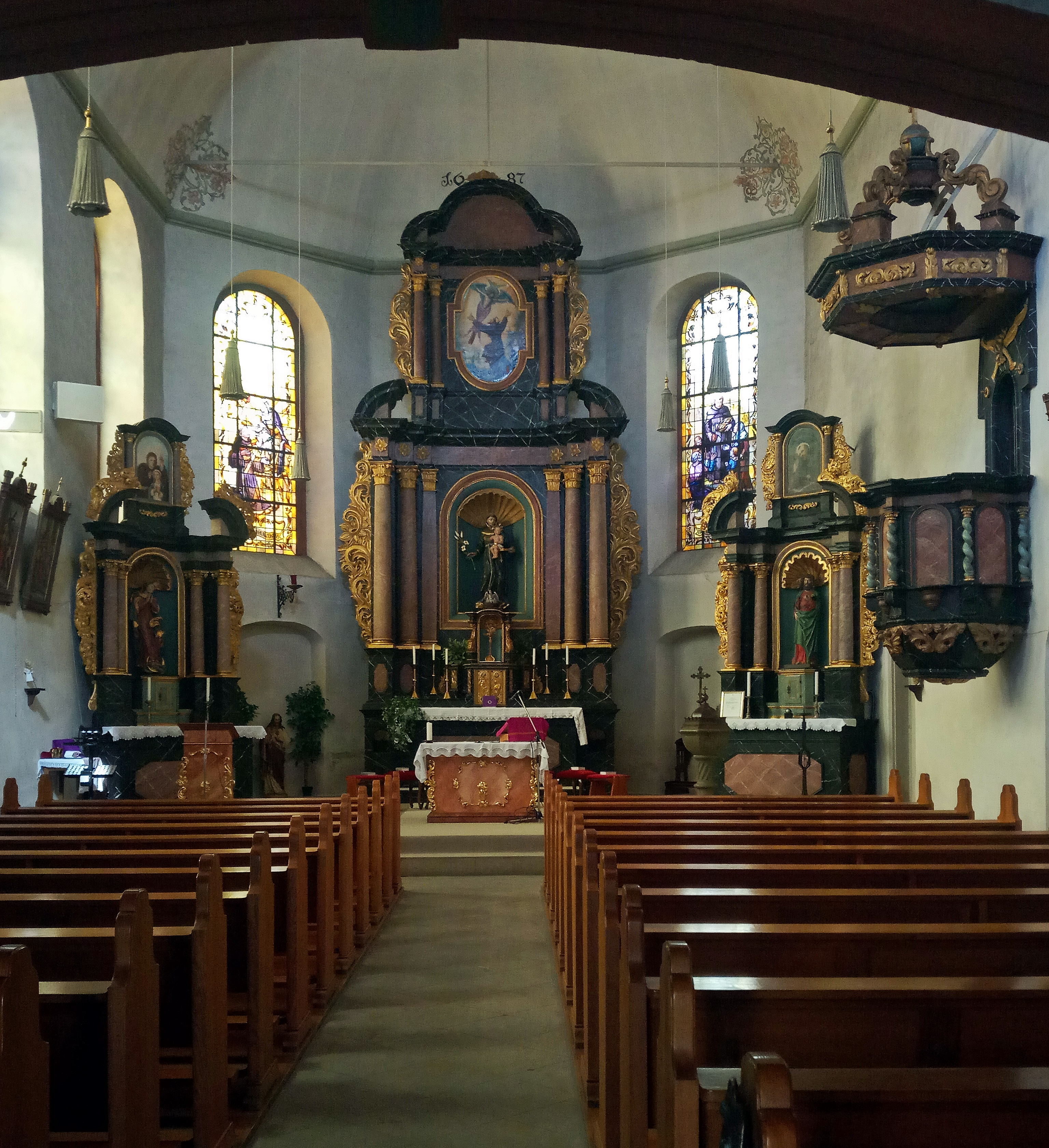 St. Antoniuskirche Meisenheim, innen